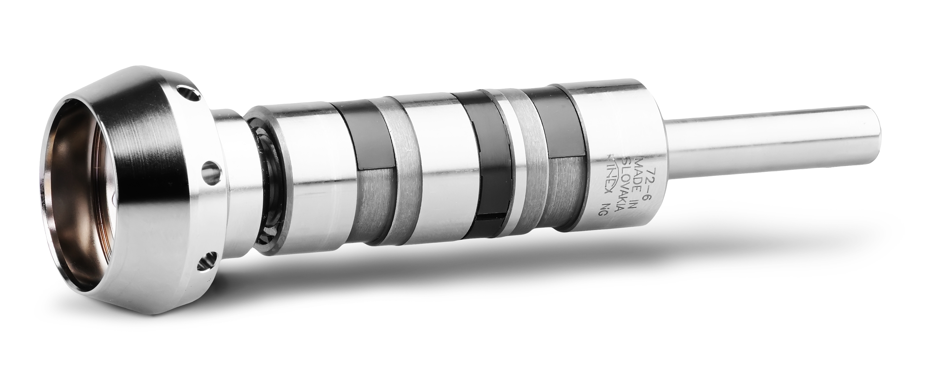 Textilné ložisko